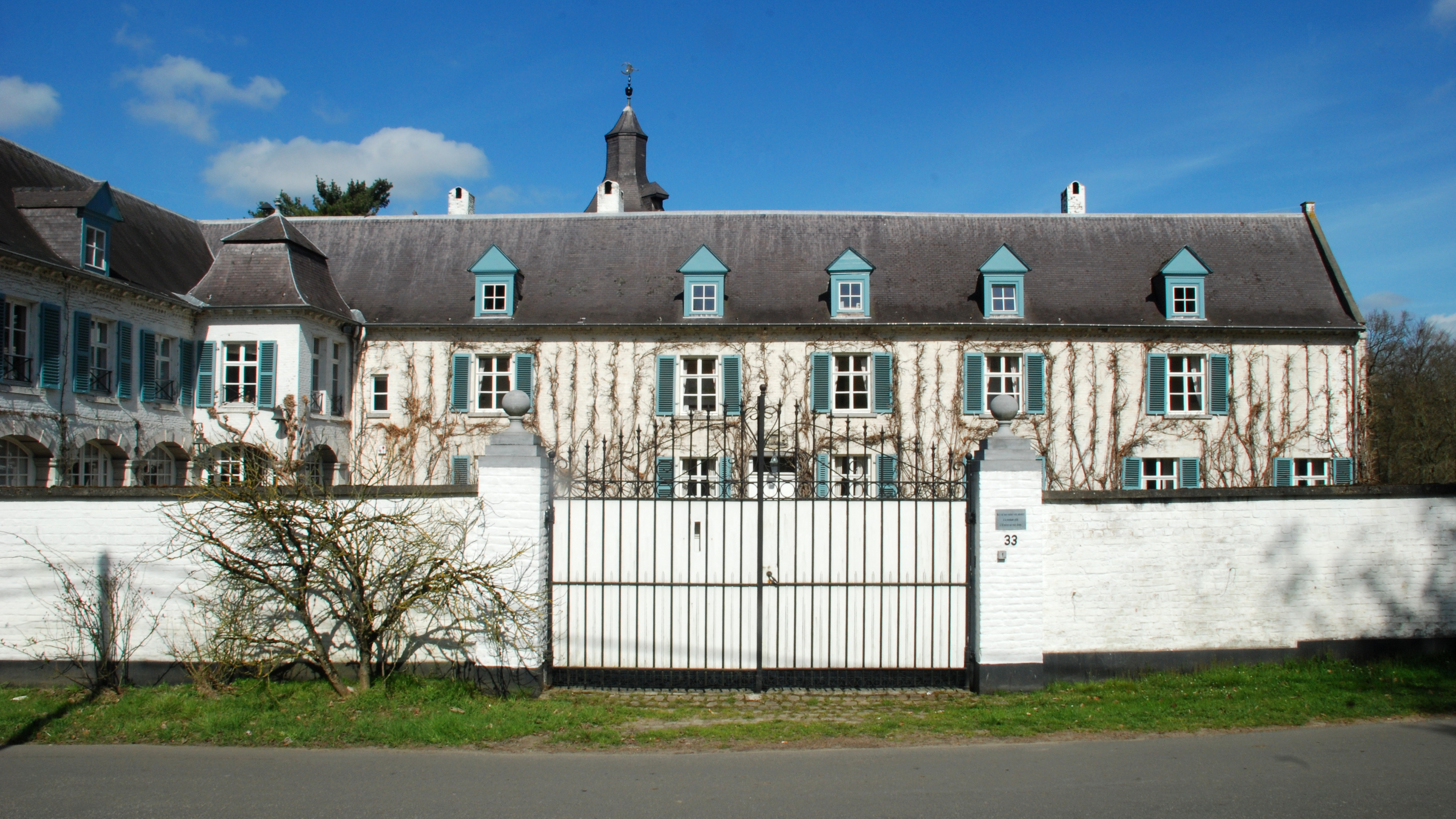 Belgique - Brabant wallon - Genappe - Château de Bousval